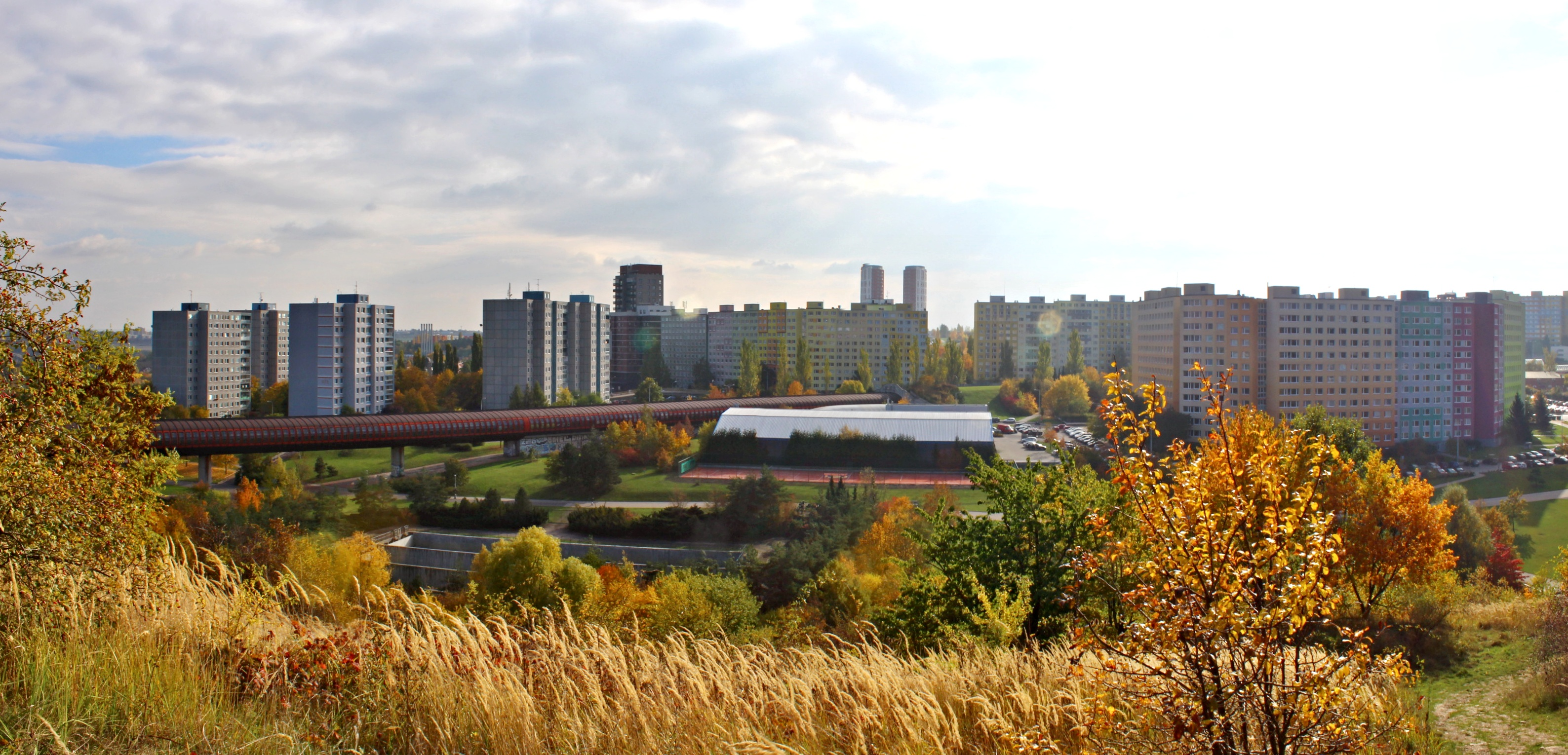 Centrální park Lužiny (Praha-Stodůlky)